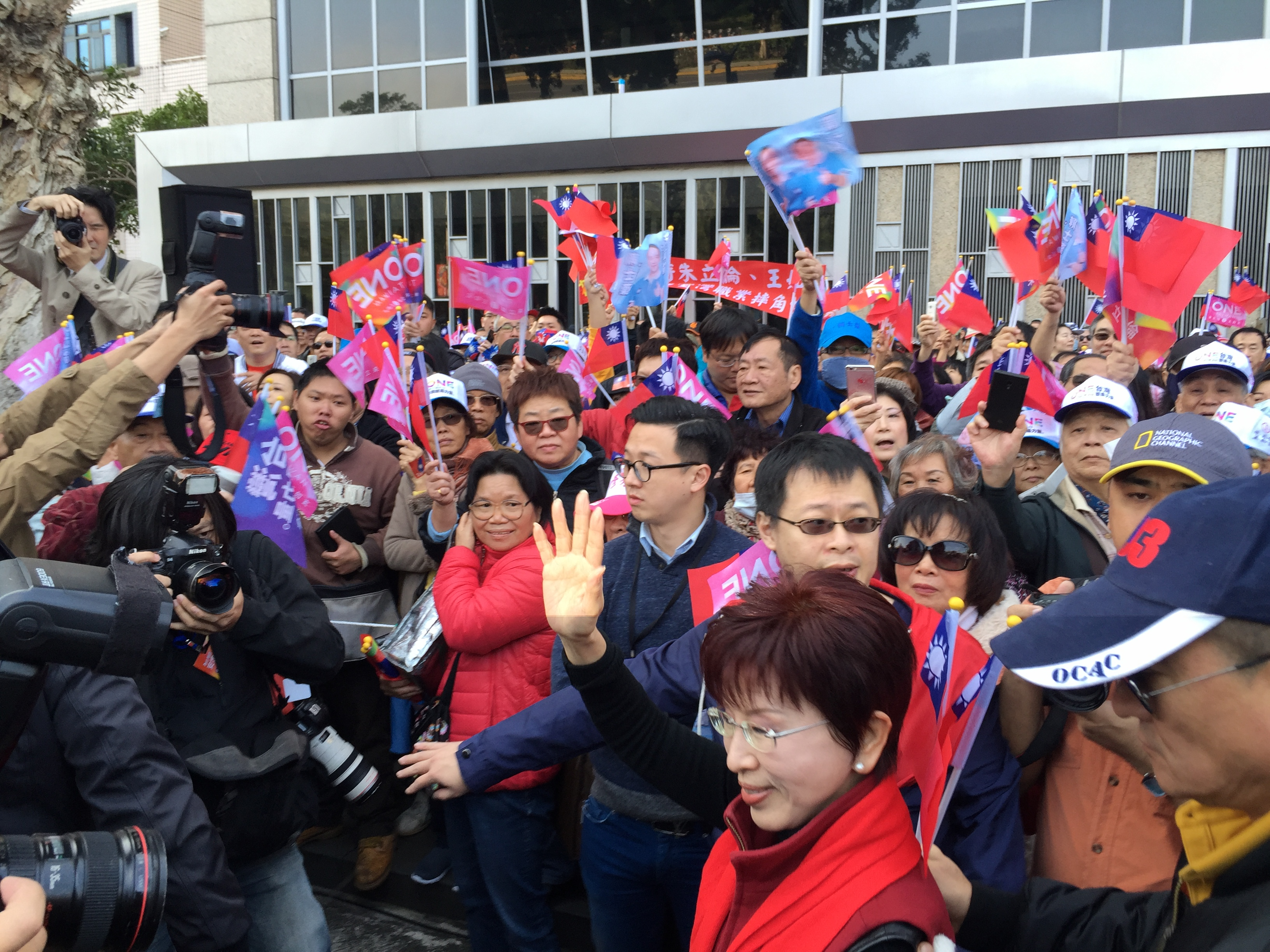 中文（台灣）: 民調落後的國民黨造勢遊行